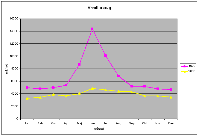 Månedligt vandforbrug på Rebild Vandværk (ca. 230 forbrugere) før og efter opsætning af vandur.